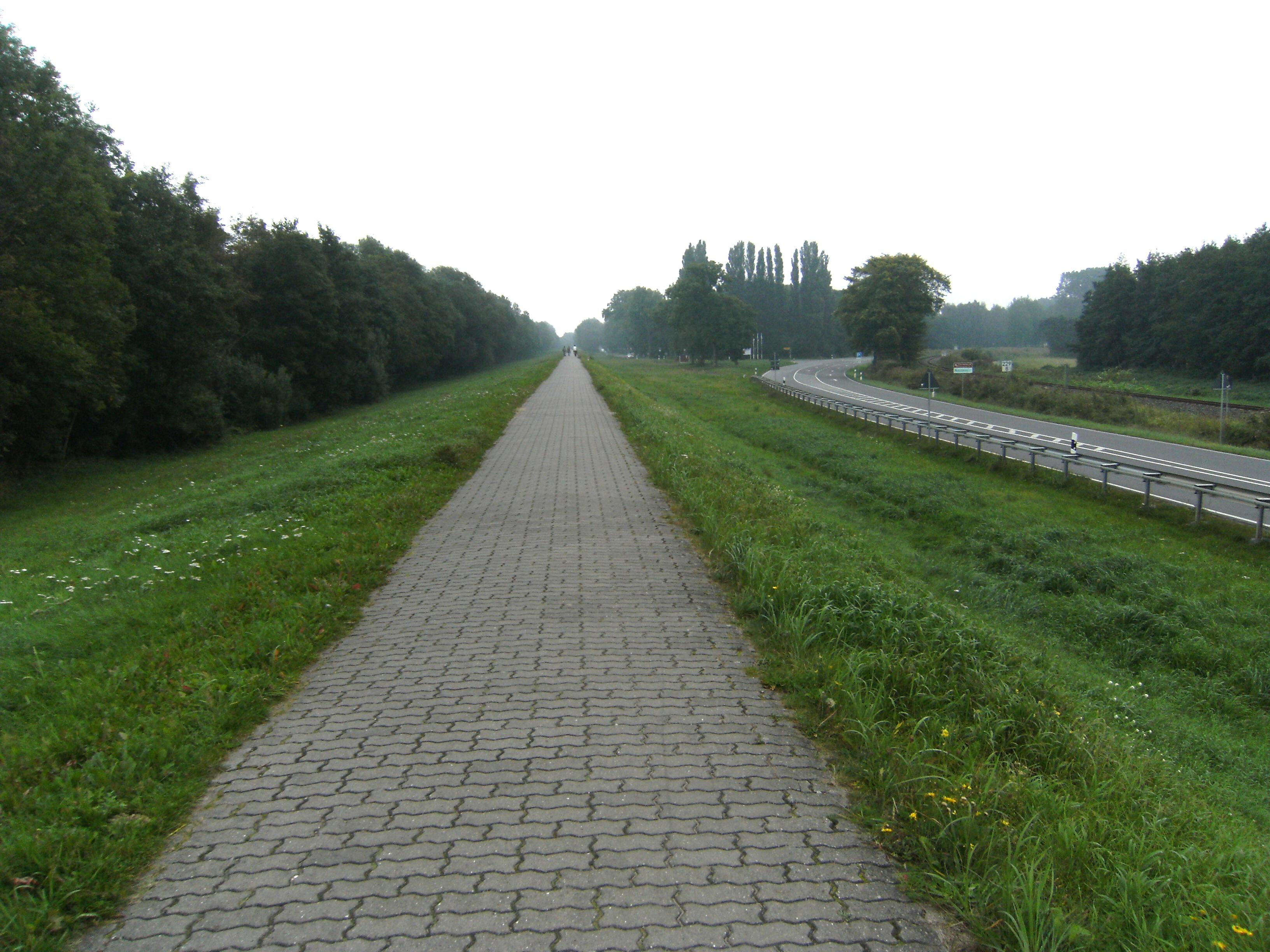 Deich Zempin-Koserow